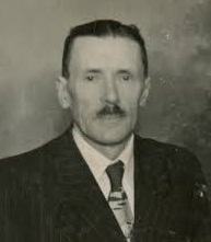 Florian Czarnyszewicz - zdjęcie portretowe, źródło: „Głos Polski” (Buenos Aires) 1965, nr 39(2998).